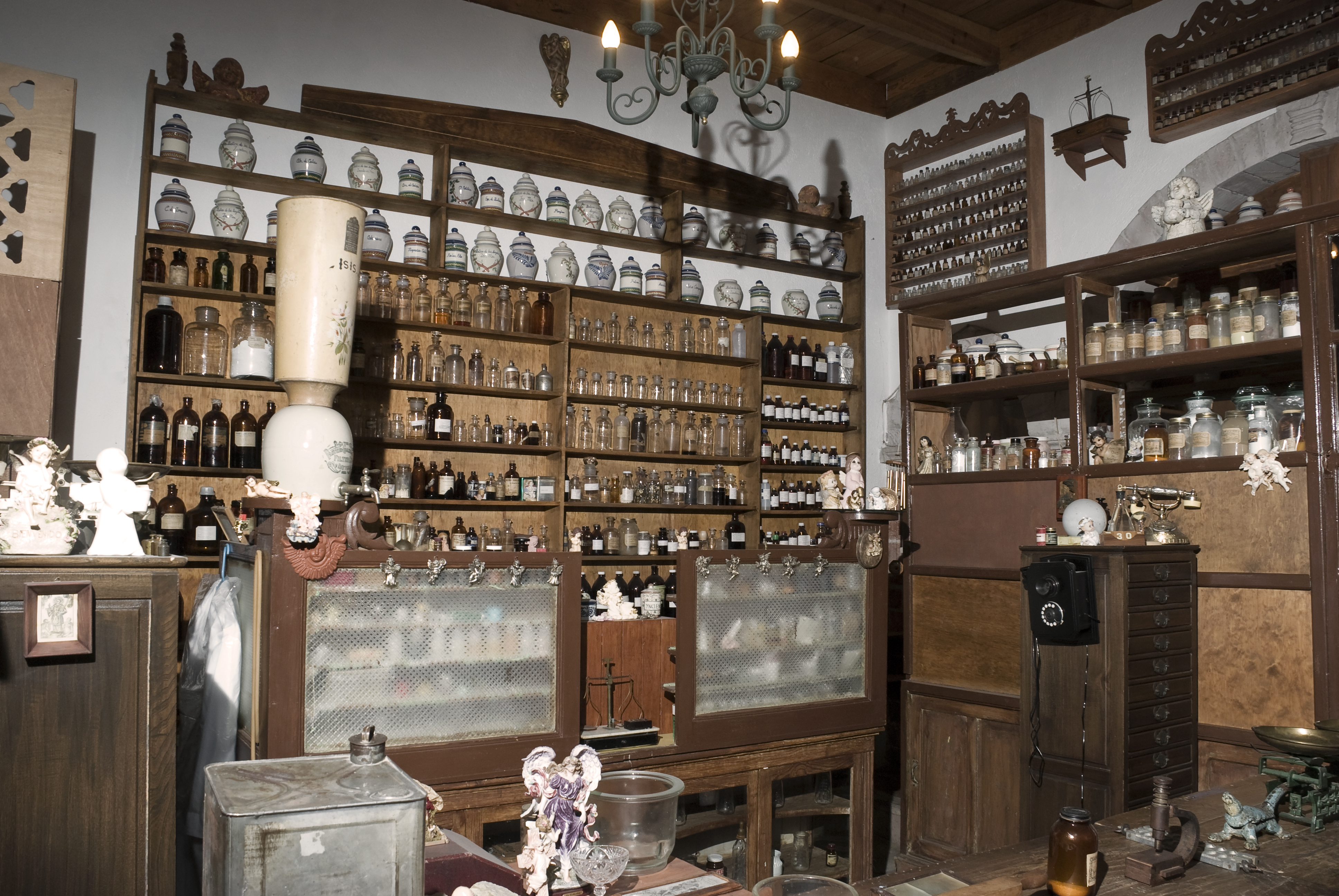 Soy un babas, olvidé el nombre de esa droguería... Pero estoy seguro que ustedes se acuerdan. Buen hallazgo. Está repleta de ángeles porque la gente se los regalaba para agradecerles por los mejunjes.